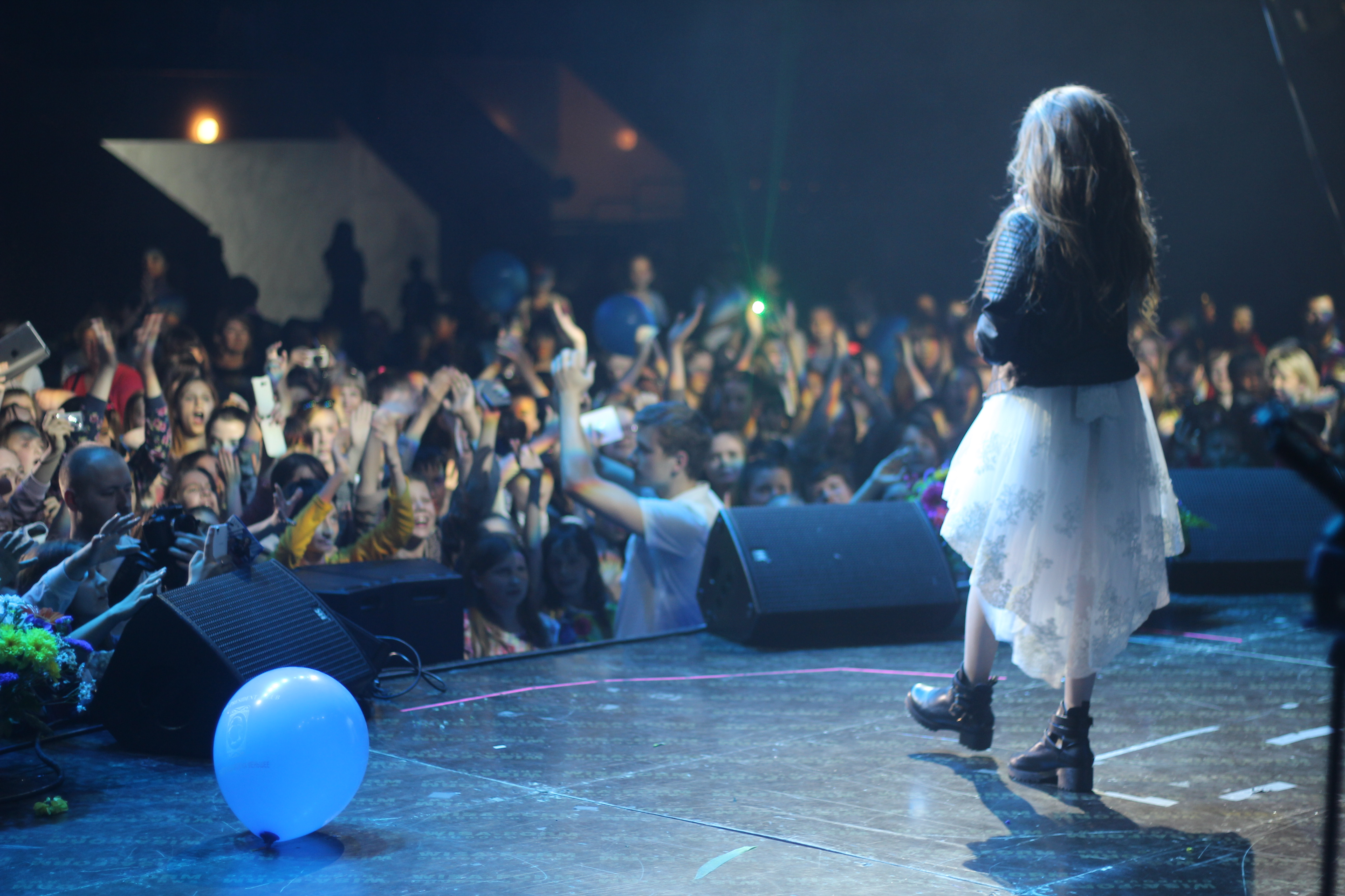 Алиса Кожикина на первом сольном концерте, который прошёл 13 мая 2016 года в Белгороде